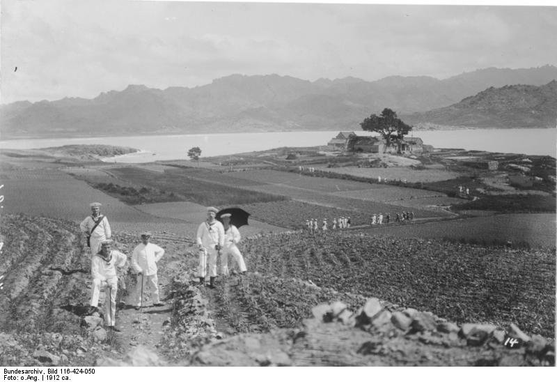 China, Tsingtau China, Tsingtau um 1912 [China, Tsingtau.- Matrosen bei Feldarbeit (?) Fotoalbum: Bilder aus China, von Ob.Matr.Artl. Quinten; Bem.: Originaltitel z.T. inkorrekt